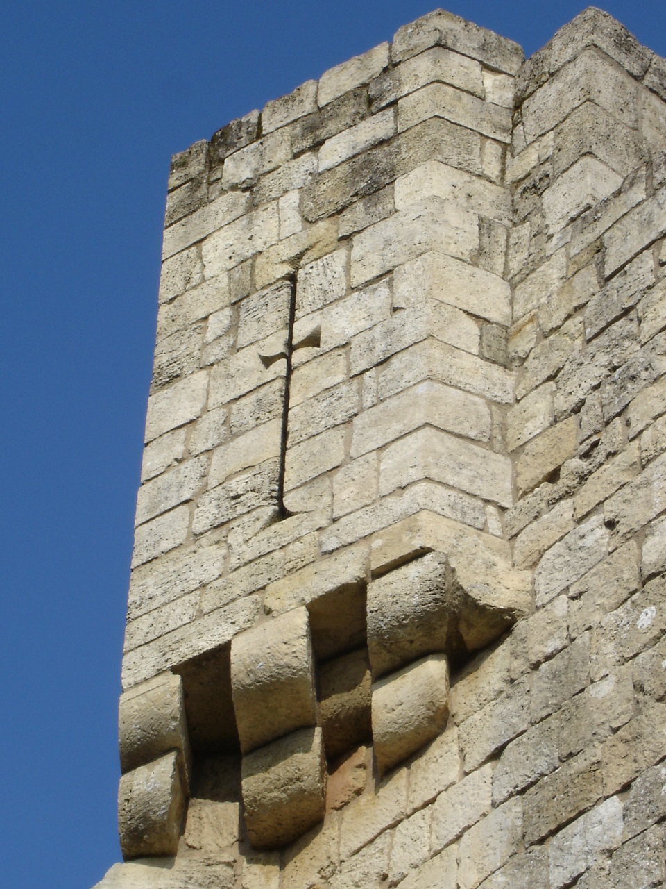 Archère dans le château de Rauzan